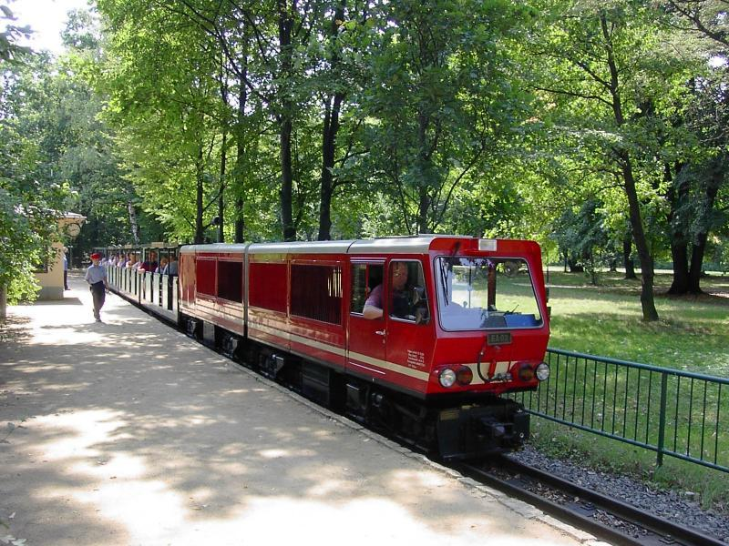 EA02 mit roter Lackierung im Bahnhof Karcheralle der Dresdner Parkeisenbahn